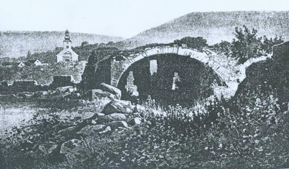 Pohled na ruiny z přelomu 19. a 20. století